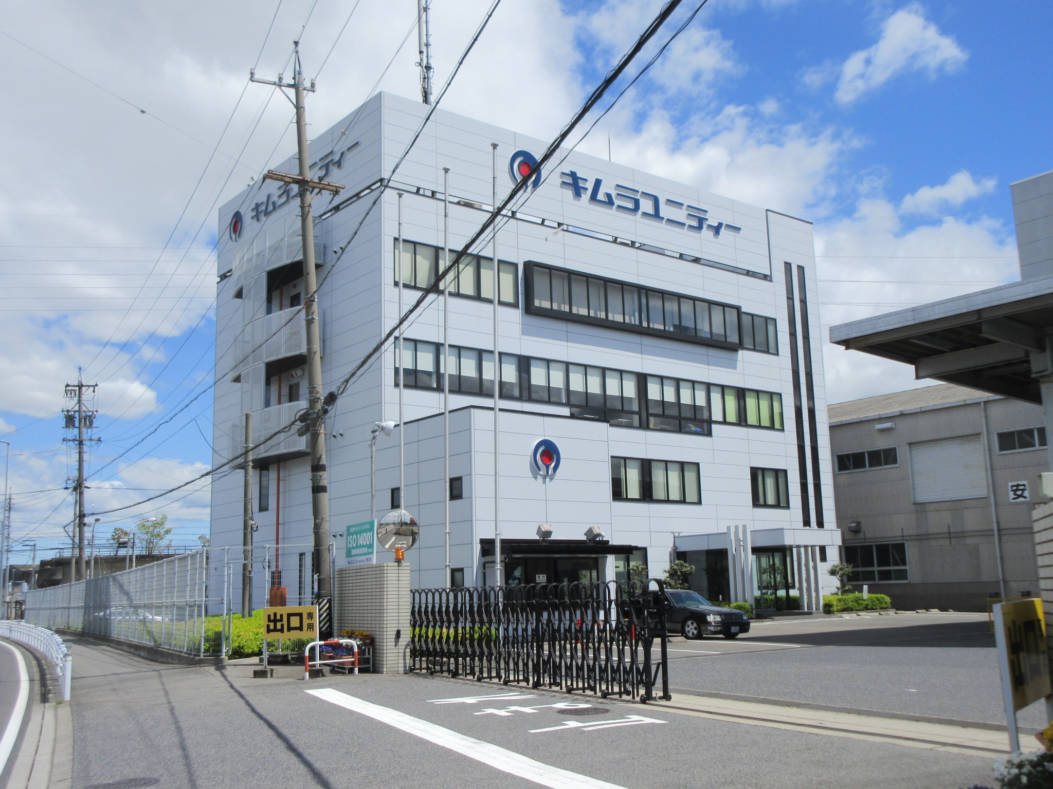 キムラユニティー豊田工場（豊田市桝塚西町）